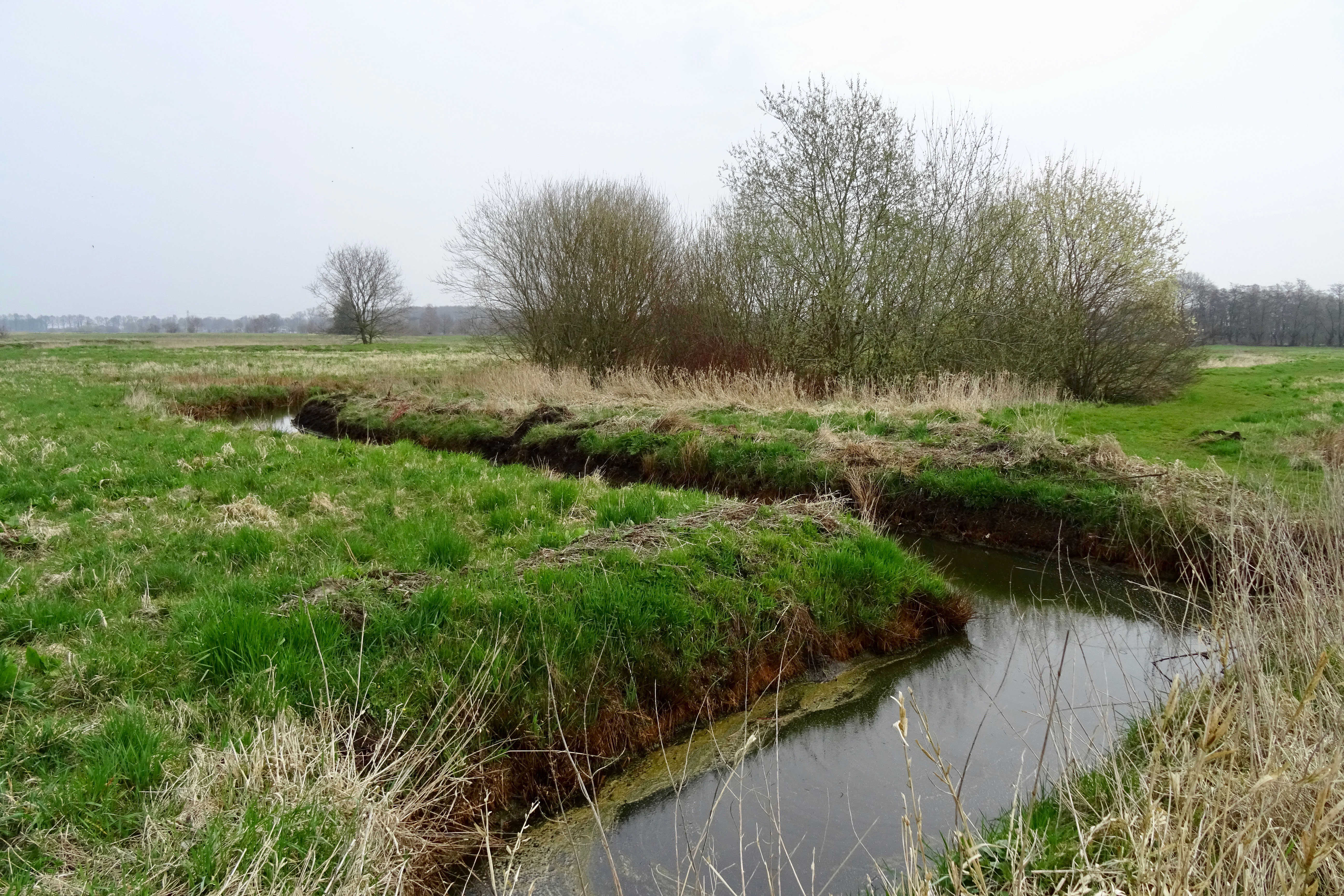 Langs de boorden van de Oude AE in het natuurgebied De Wiede tussen Veendam en Muntendam